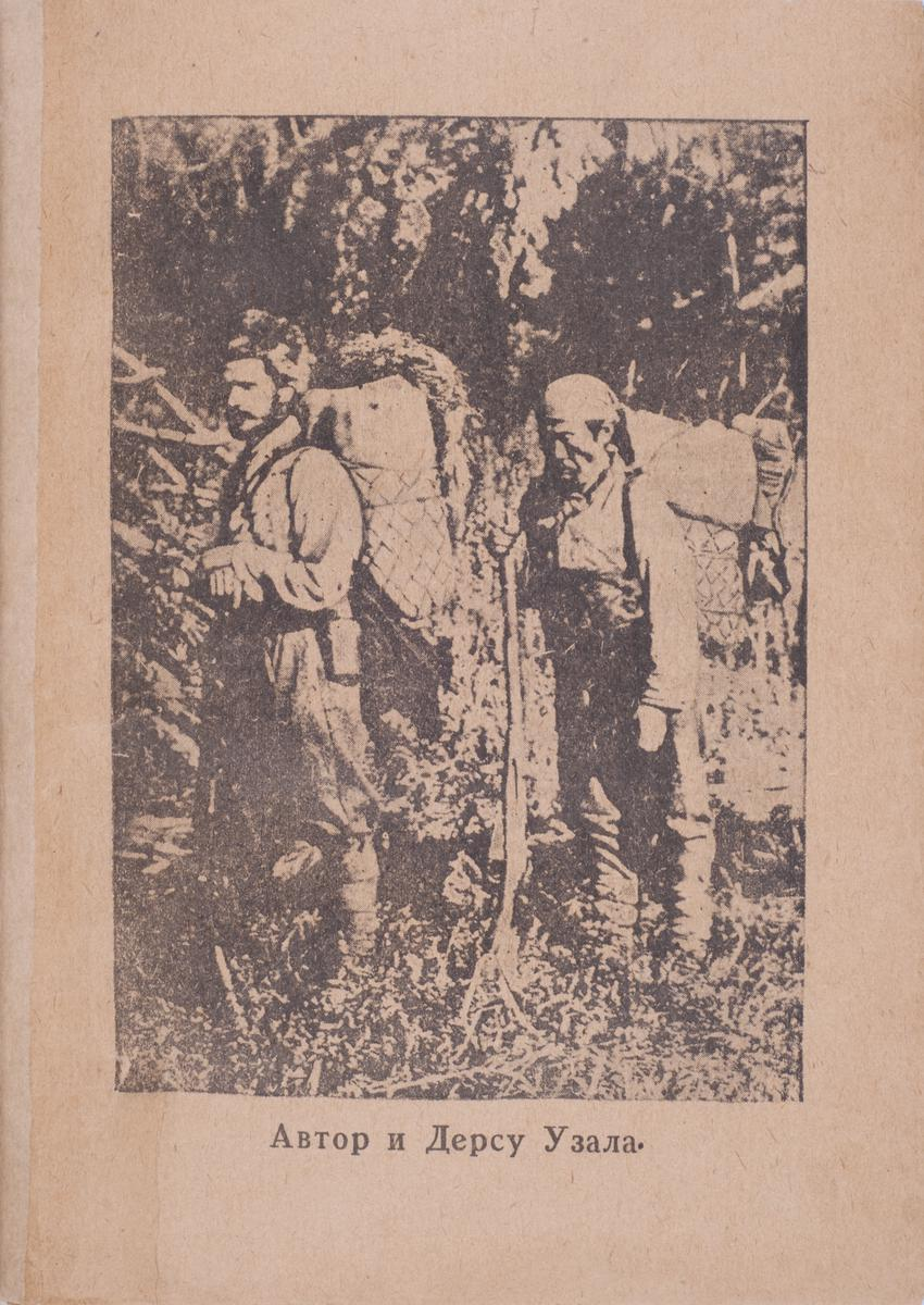 Страница книги «По Уссурийскому краю» с фотографией «Автор и Дерсу Узала». На фотографии — В. К. Арсеньев и Дерсу Узала. В источнике заявлено, что это издание 1921 года, то есть первое издание, но имеются сомнения в подлинности (книга была выставлена на аукцион), так как старая орфография здесь не используется (на другой странице в источнике используется, но непоследовательно), в отличие от страниц экземпляра того же издания из Дальневосточной государственной научной библиотеки.